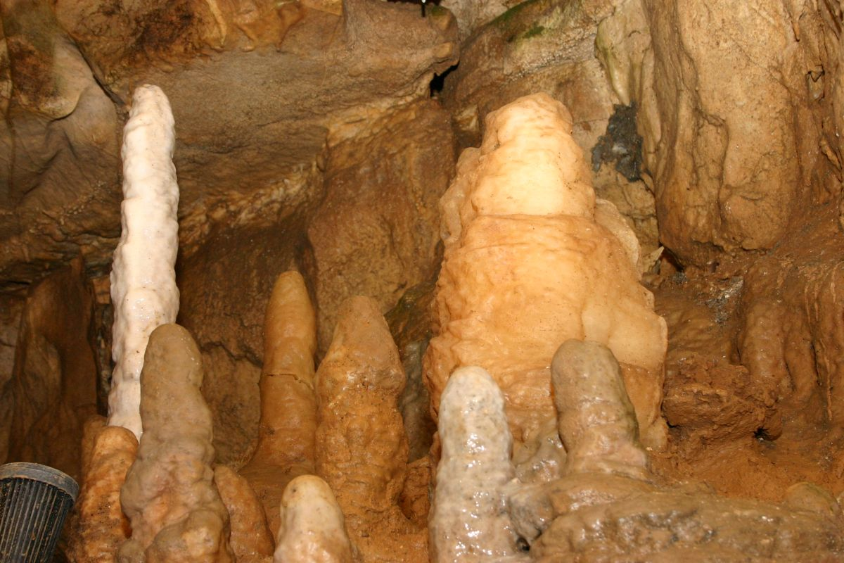 Binghöhle bei Streitberg